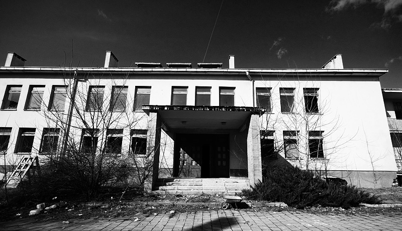 Misionierių ligoninė